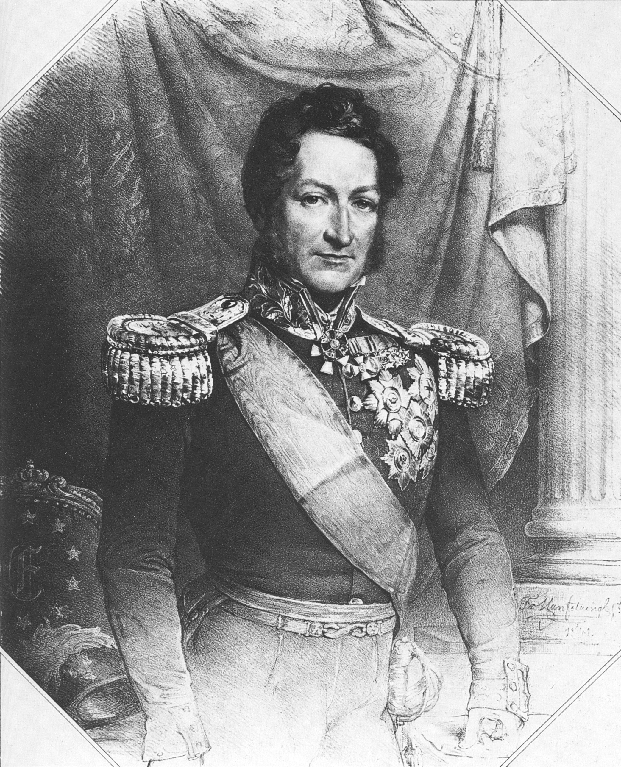 Ernst I. (Herzog von Sachsen-Coburg und Gotha) (1784-1844), Lithography